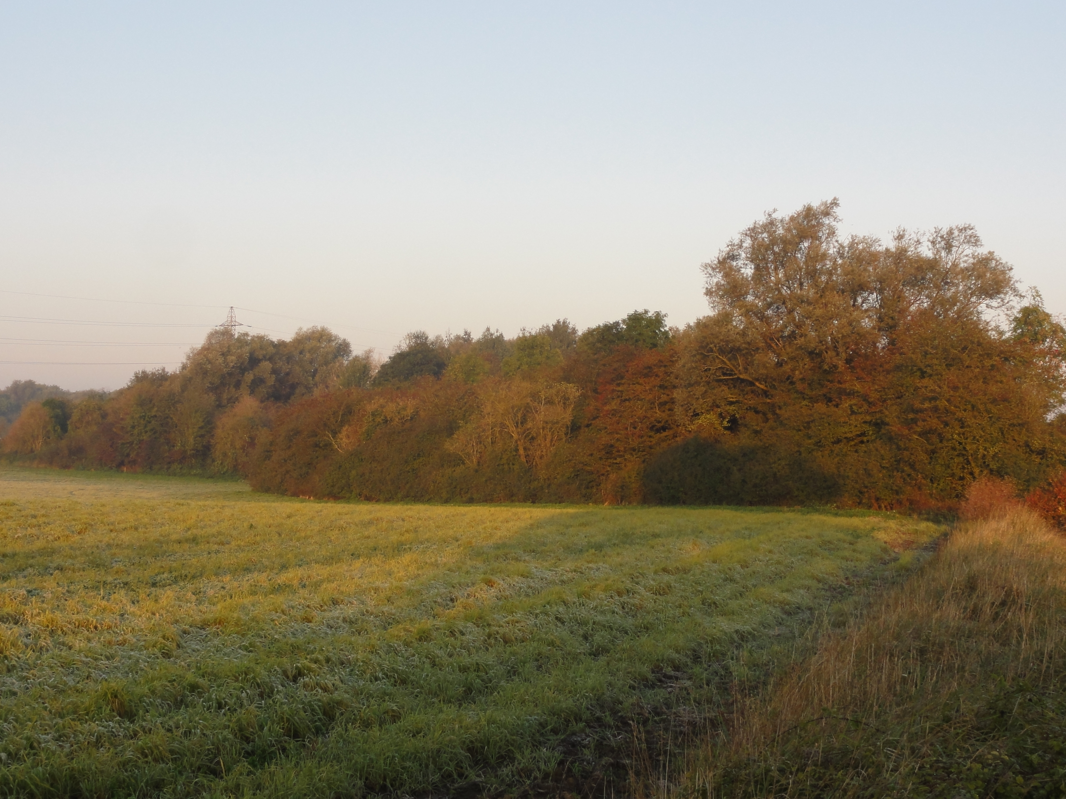 Terril n° 210 dit 16 - 18 d'Oignies, fosse n° 8 - 16 de la Compagnie des mines de Courrières dans le bassin minier du Nord-Pas-de-Calais, Courrières, Pas-de-Calais, Nord-Pas-de-Calais, France.